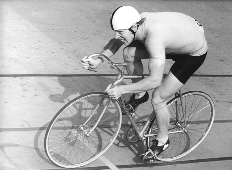 Lothar Thoms ADN-ZB Gahlbeck 1.7.78-str-Leipzig: DDR-Meisterschaften im Bahnradsport - Erster Titelträger wurde am 30.6. der Cottbusser Weltmeister Lothar Thoms im 1.000 m Zeitfahren. Mit 1:05,85 min stellte er dabei einen neuen Bahnrekord für die Leipziger Alfred-Rosch-Kampfbahn auf.